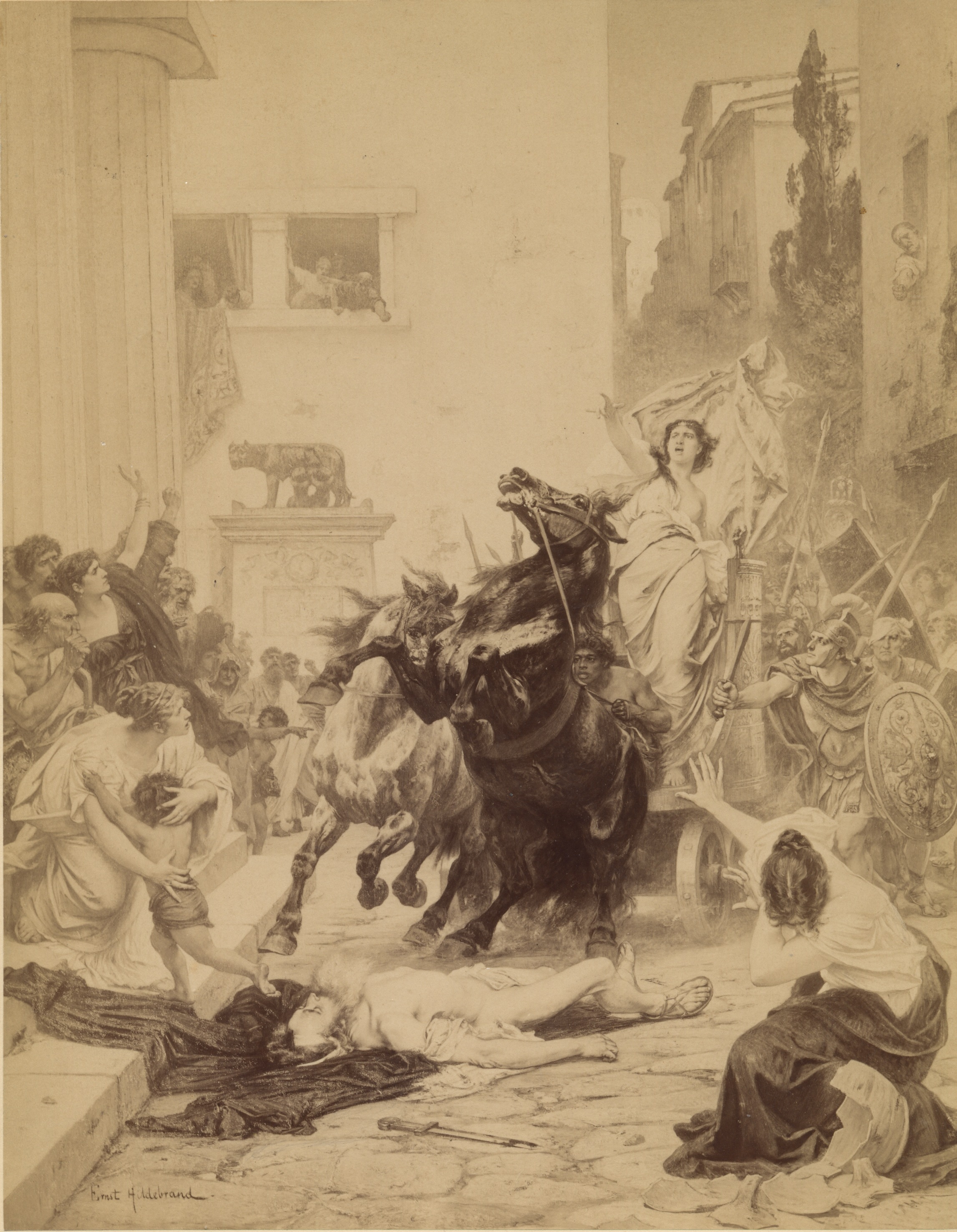 Tullia kör över sin döende fader.